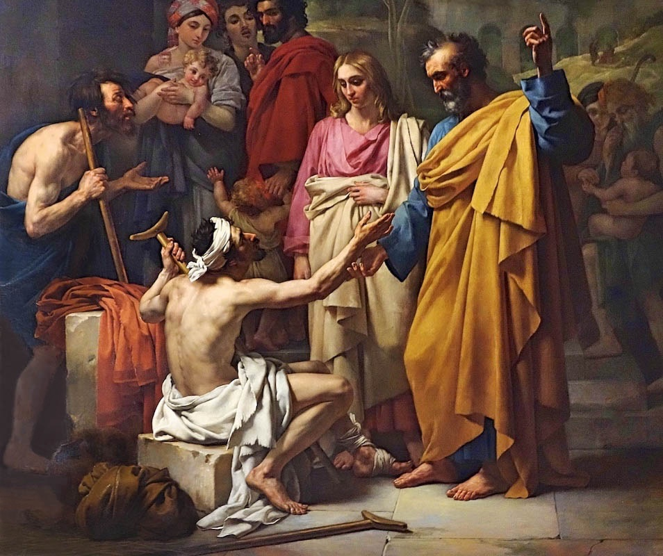 Tableau de Louis-Vincent-Léon Pallière de 1819, église Saint-Thomas d’Aquin, Paris VIIe.